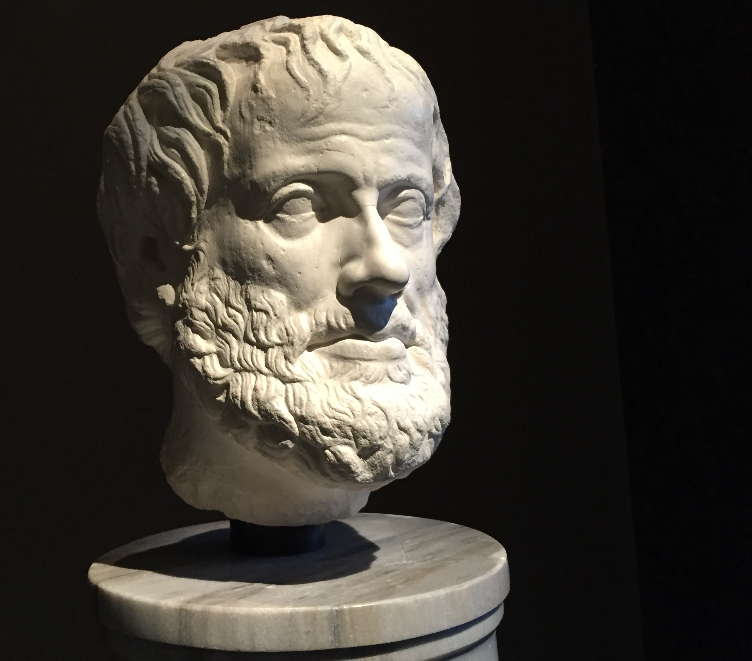 Römische Kopie nach griechischem Original um 320 v. Chr., Marmor, Inv.-Nr. I 246